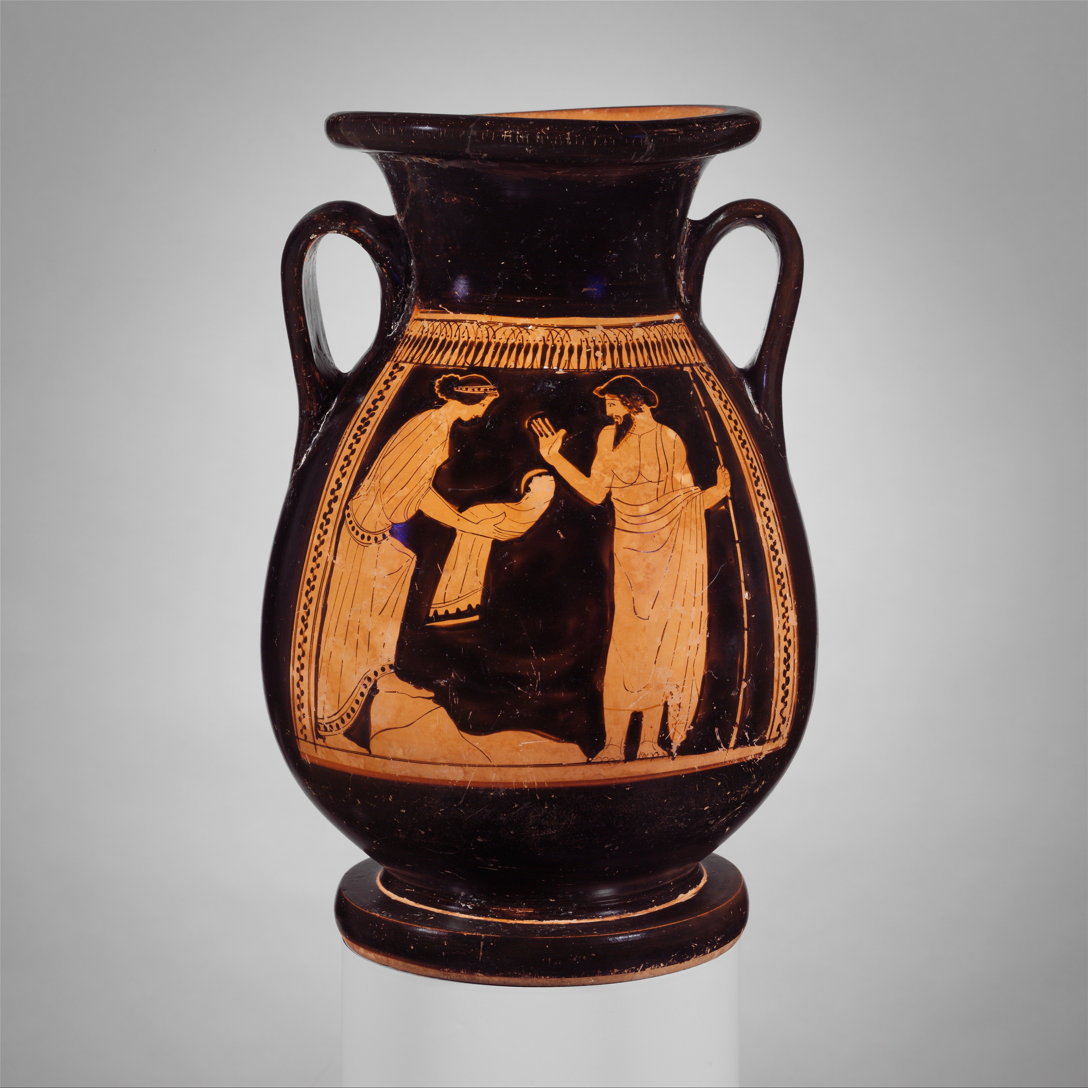 Greek, Attic; Pelike; Vases